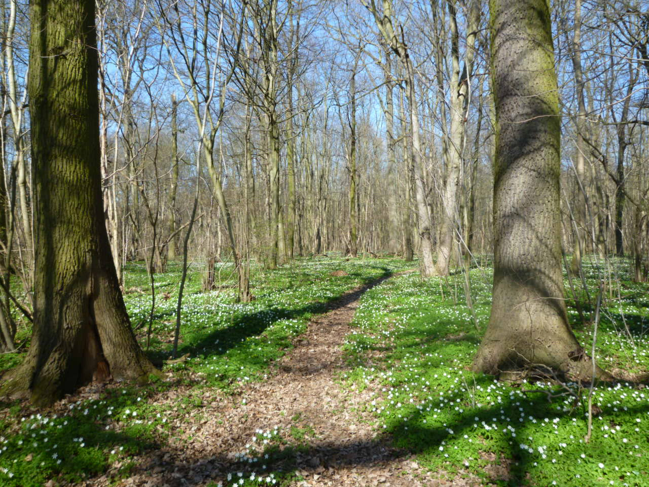 Rantenhorst beim Jägersteg, Bereich im Naturschutzgebiet „Klüdener Pax-Wanneweh“ in Sachsen-Anhalt